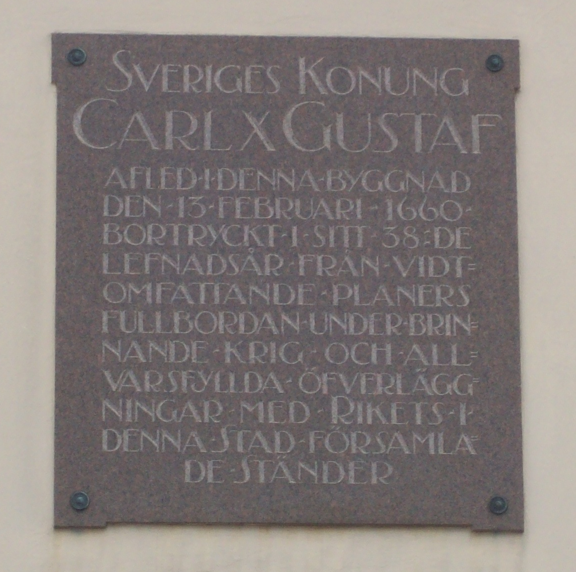 Inom vallgraven 53:16 (f.d. Residenset K:1), Länsresidenset, Göteborg. Minnesskylt Carl X Gustaf. Skylten är placerad på fasaden mot Stora Badhusgatan.